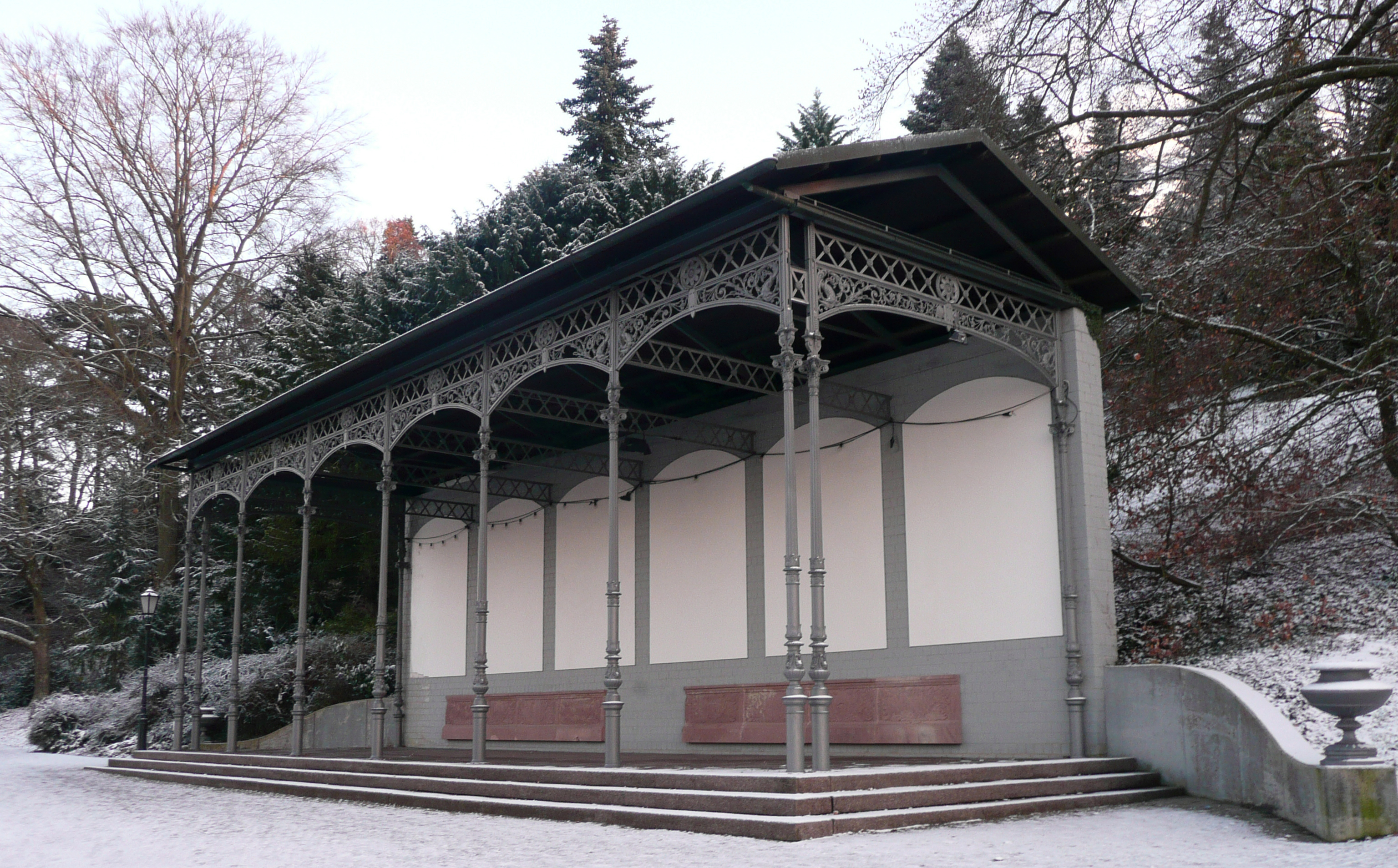 Wandelbahn am Neuen Vogesenblick in Badenweiler